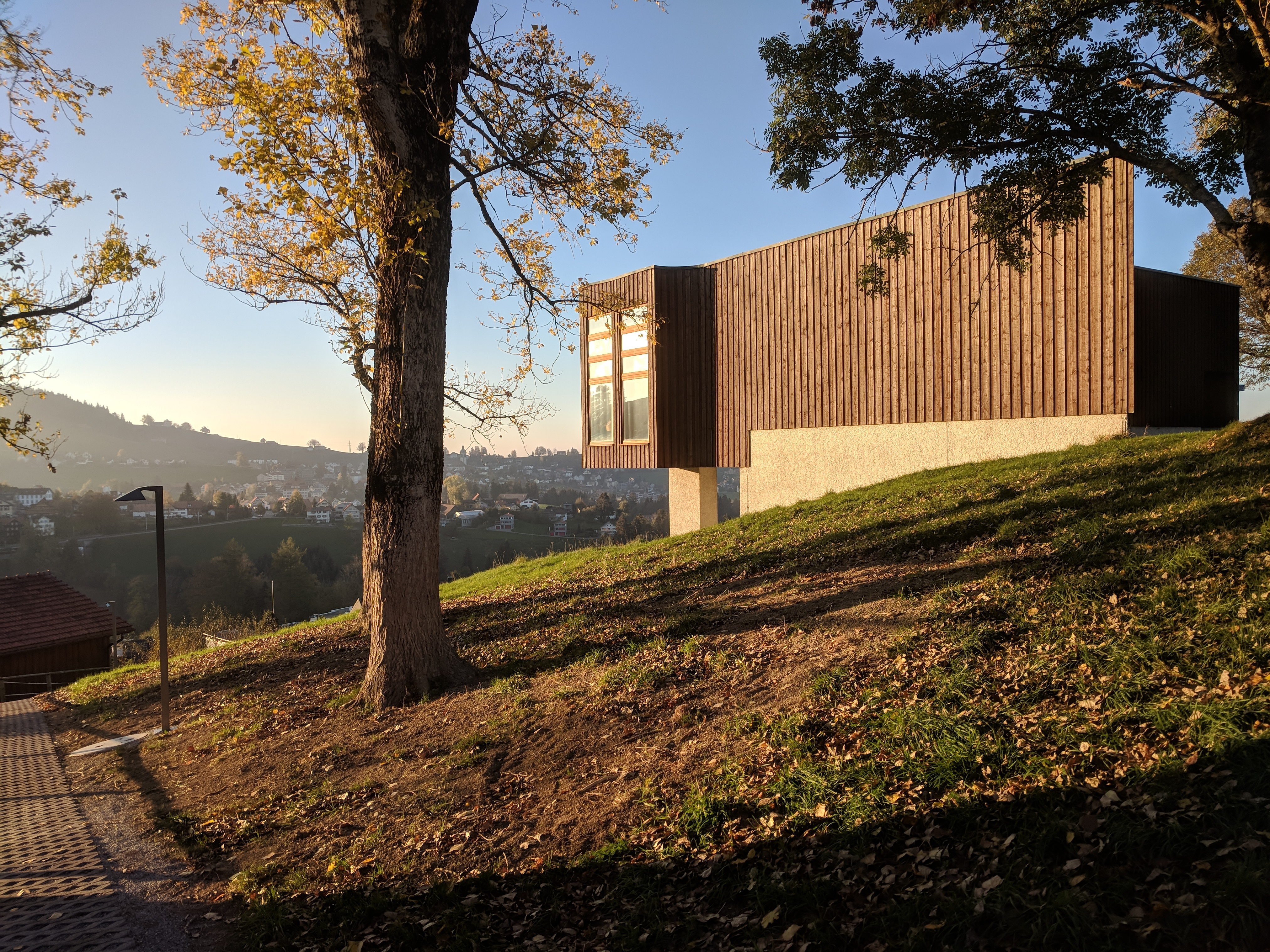 Erbaut 1967 durch Ernst Gisel